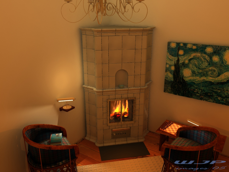 Rendering mit 3D Studio Max selbst erstellt.